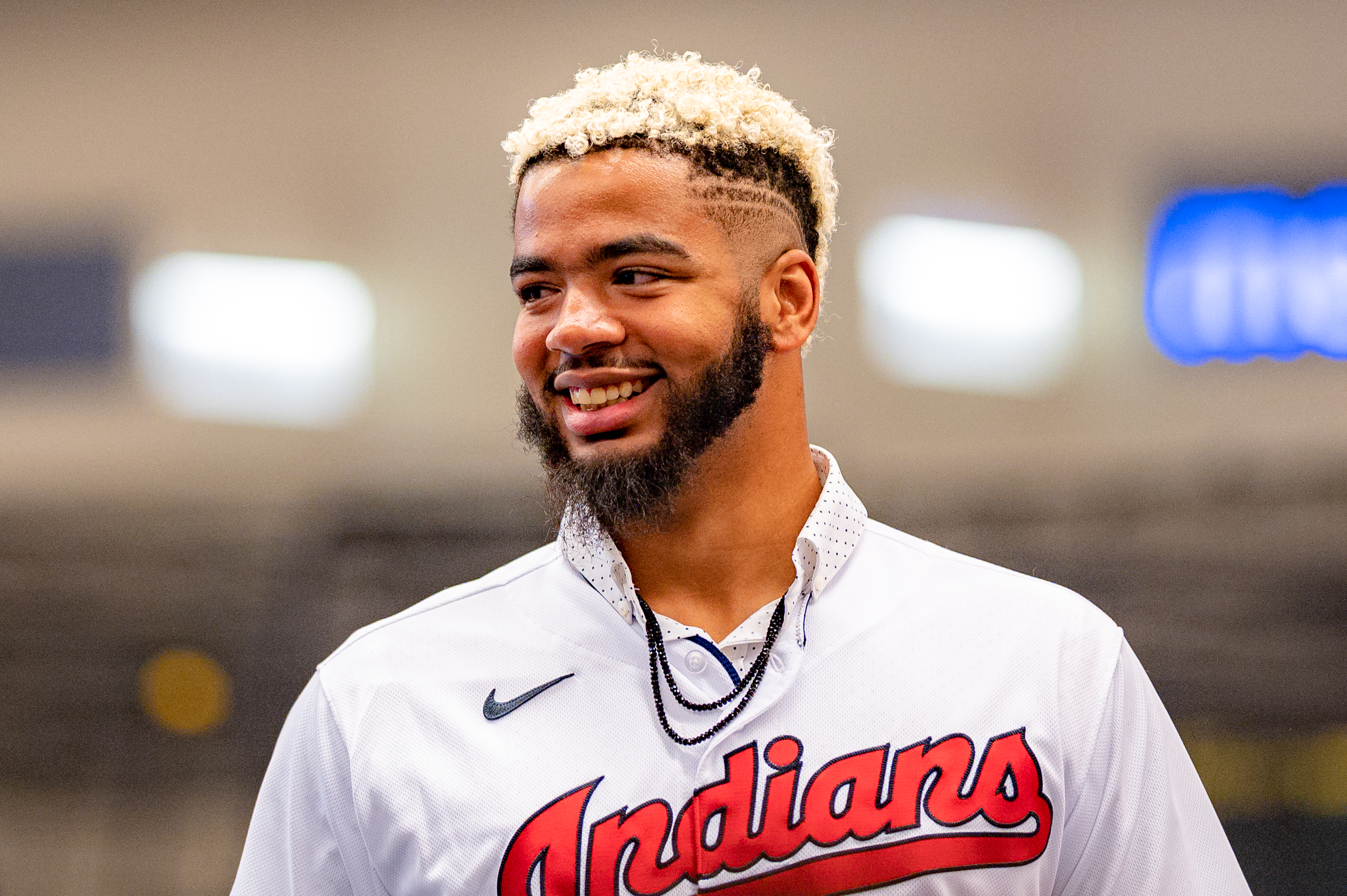 Tribe Fest 2020